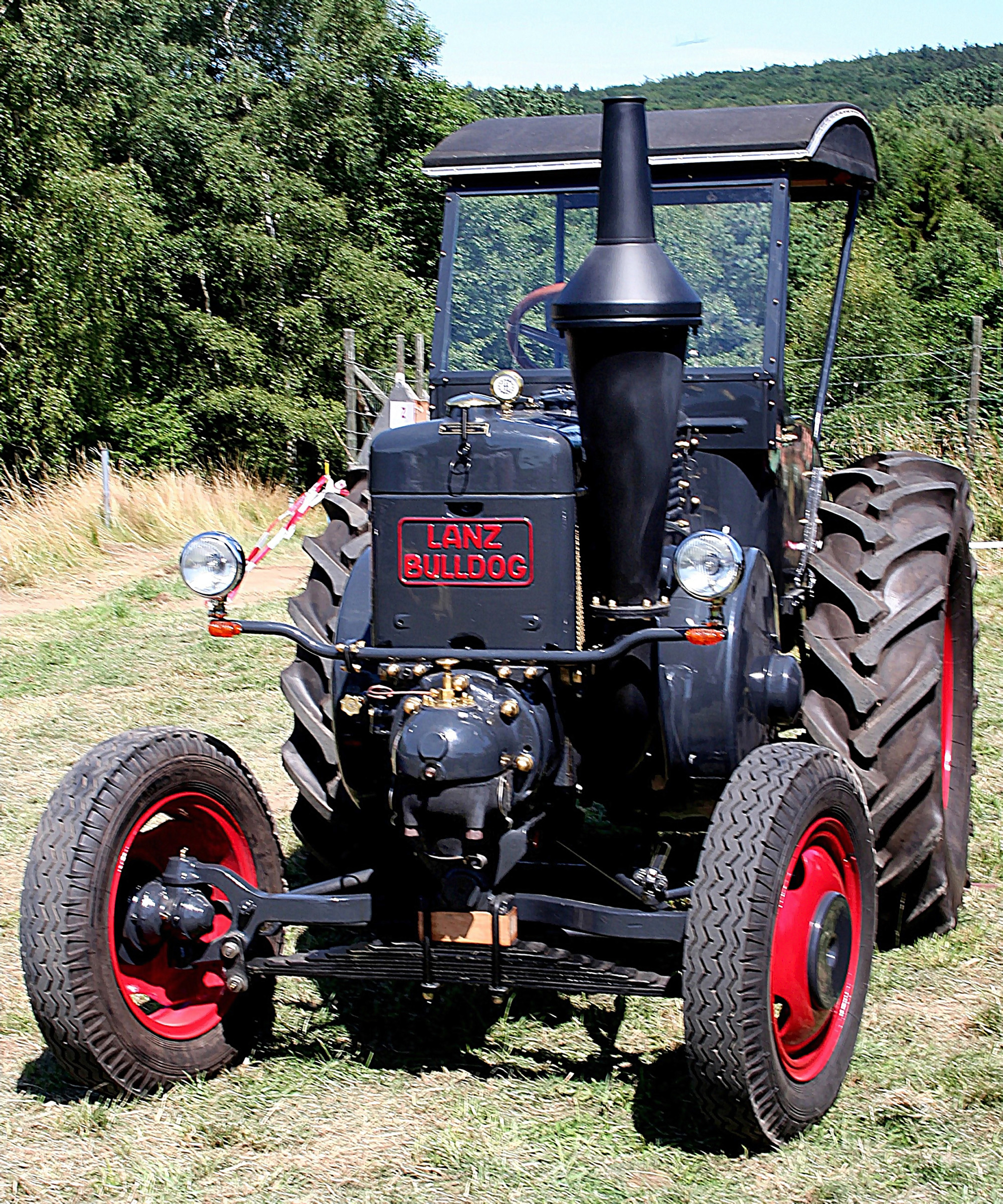 Lanz Bulldog der Baureihe D 8506, Baujahr 1939 (Bauzeit 1936 bis 1954), Einzylinder-Glühkopfmotor, Hubraum 10.338 cm³, 35 PS, aufgenommen am 15.07.2006 beim Traktortreffen in Hillscheid.